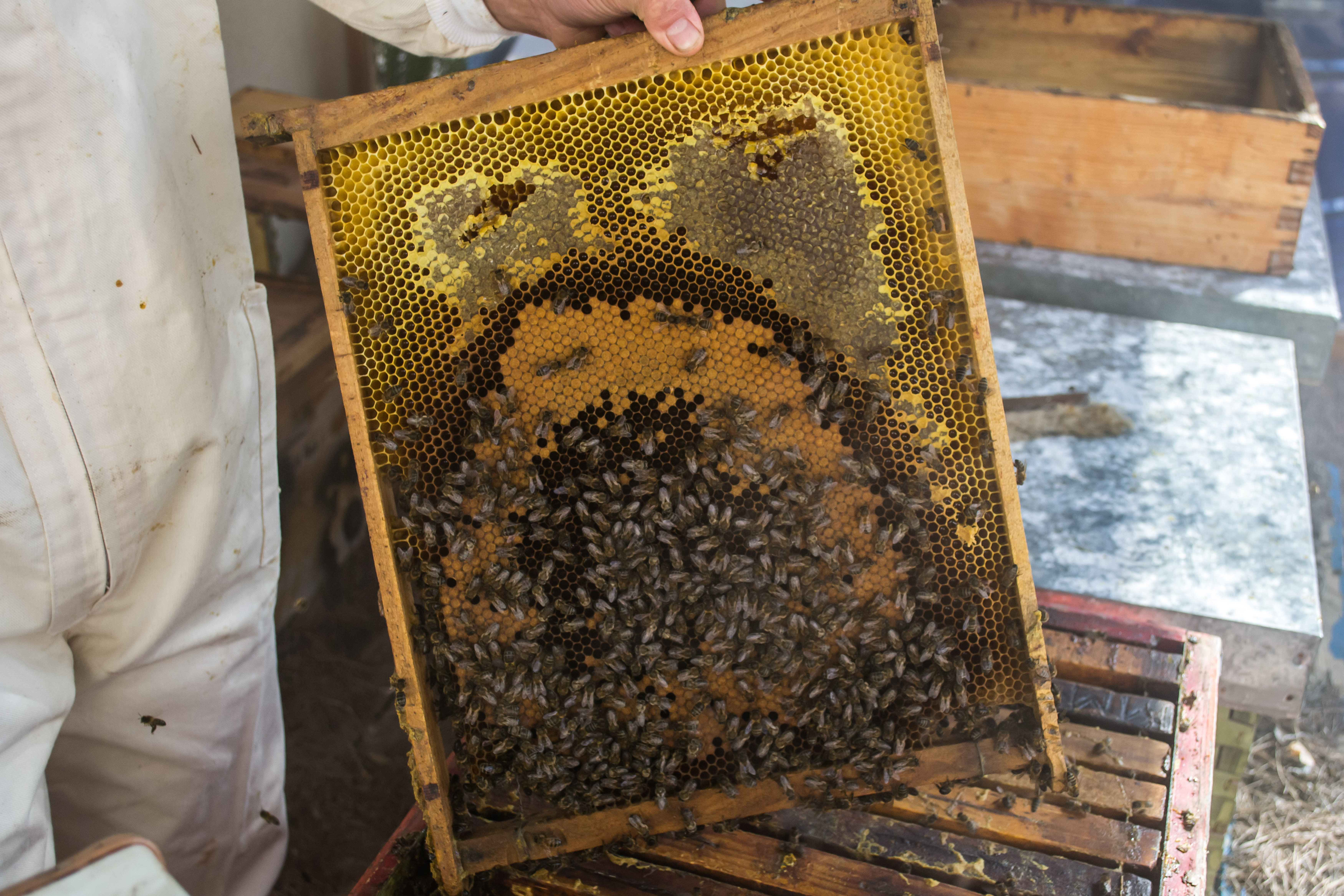 Abejas melíferas en el Primer Corte de la Miel, en Ayora, Valencia.